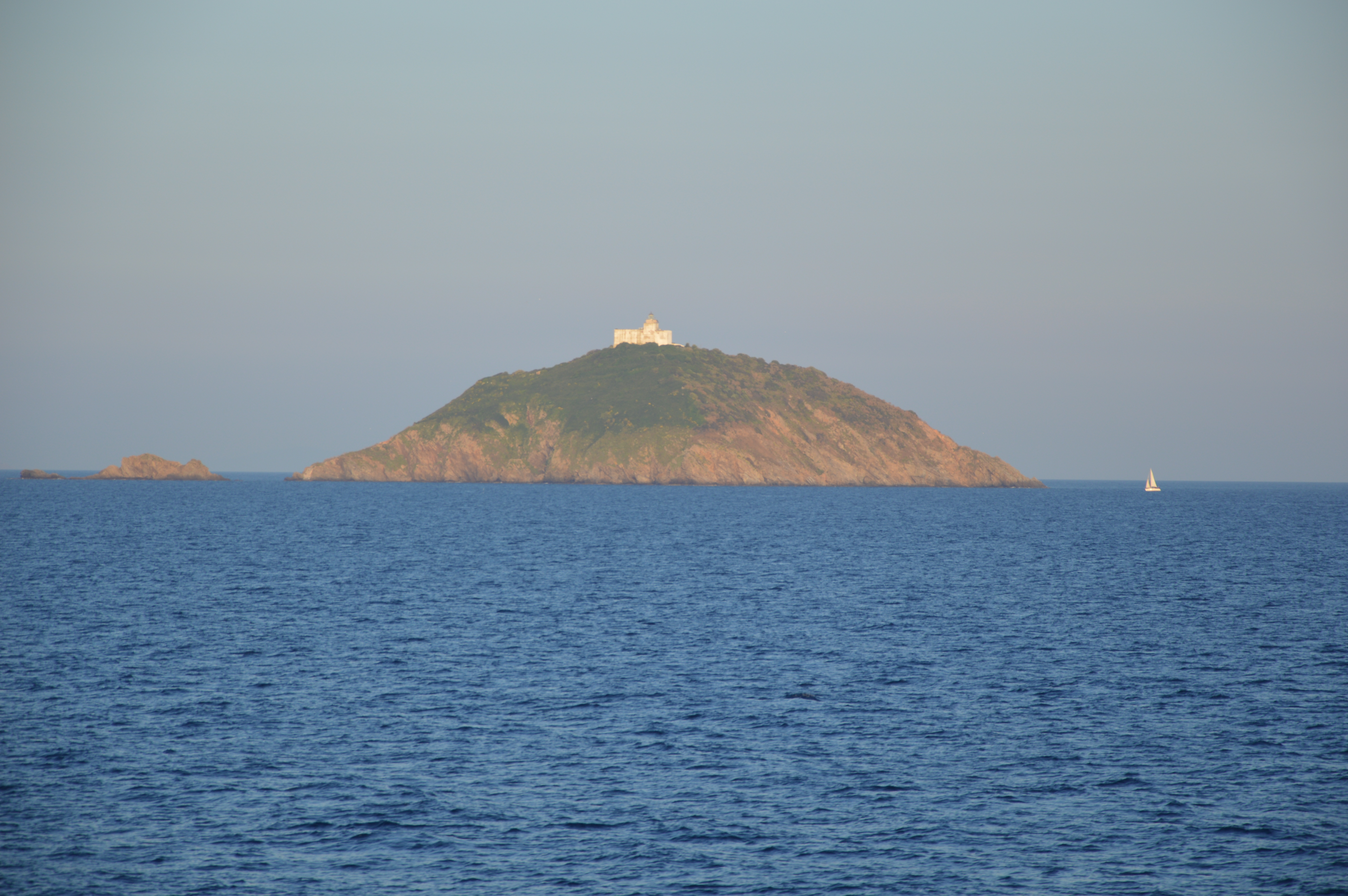 L'isola di Palmaiola vista dal traghetto vicino all'Elba